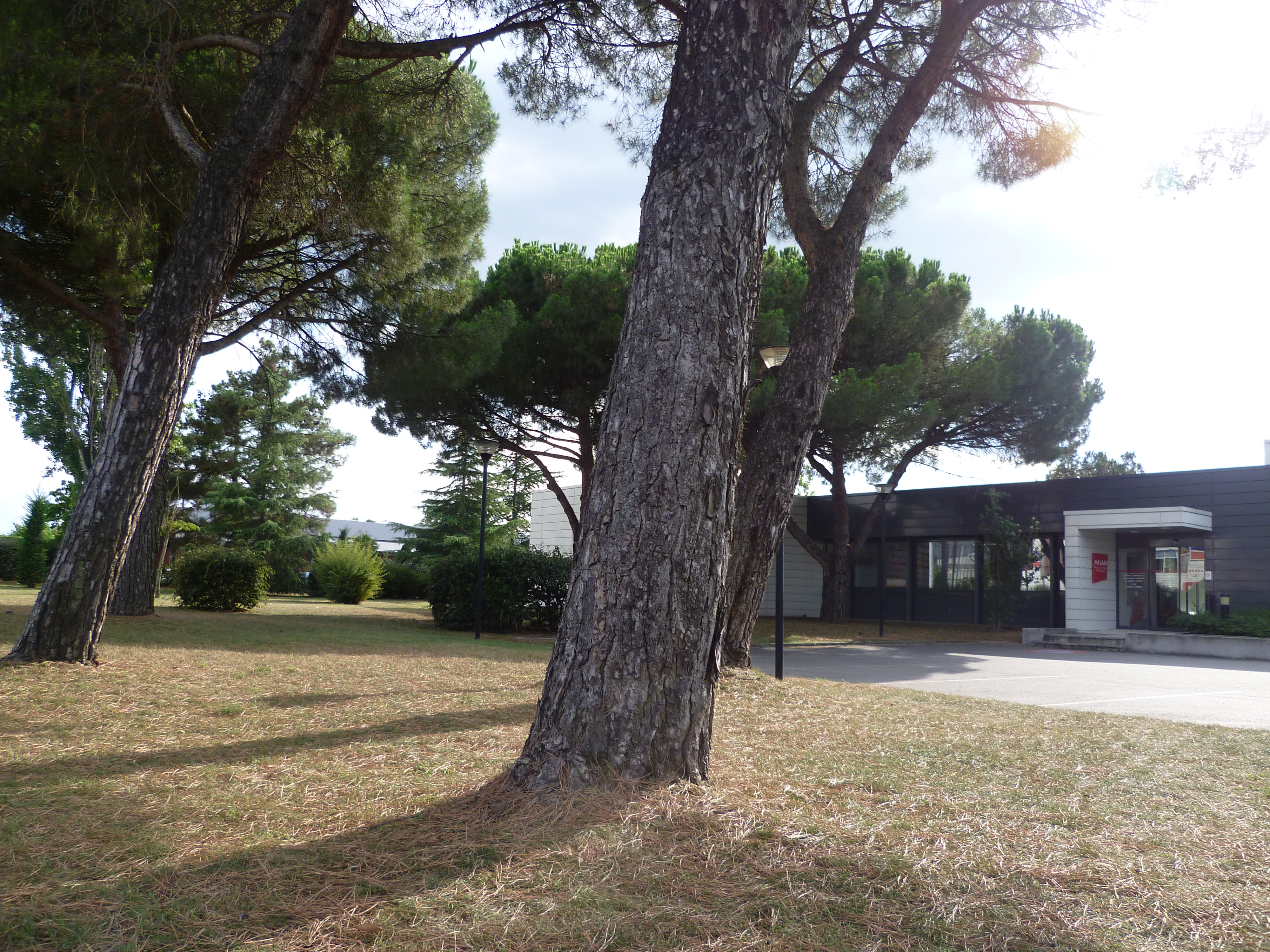 Toulouse (Haute-Garonne, France) : Le siège des éditions Milan Presse.